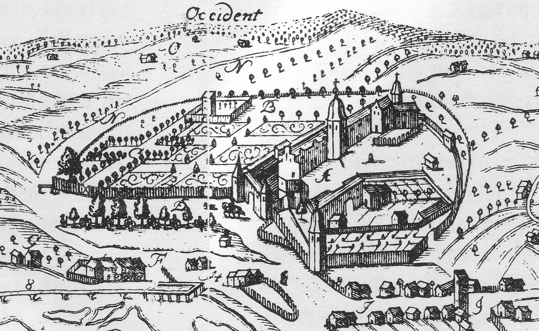 Ausschnitt des Prospectes des Schloss Bruch und Mülheim sambt der gegend